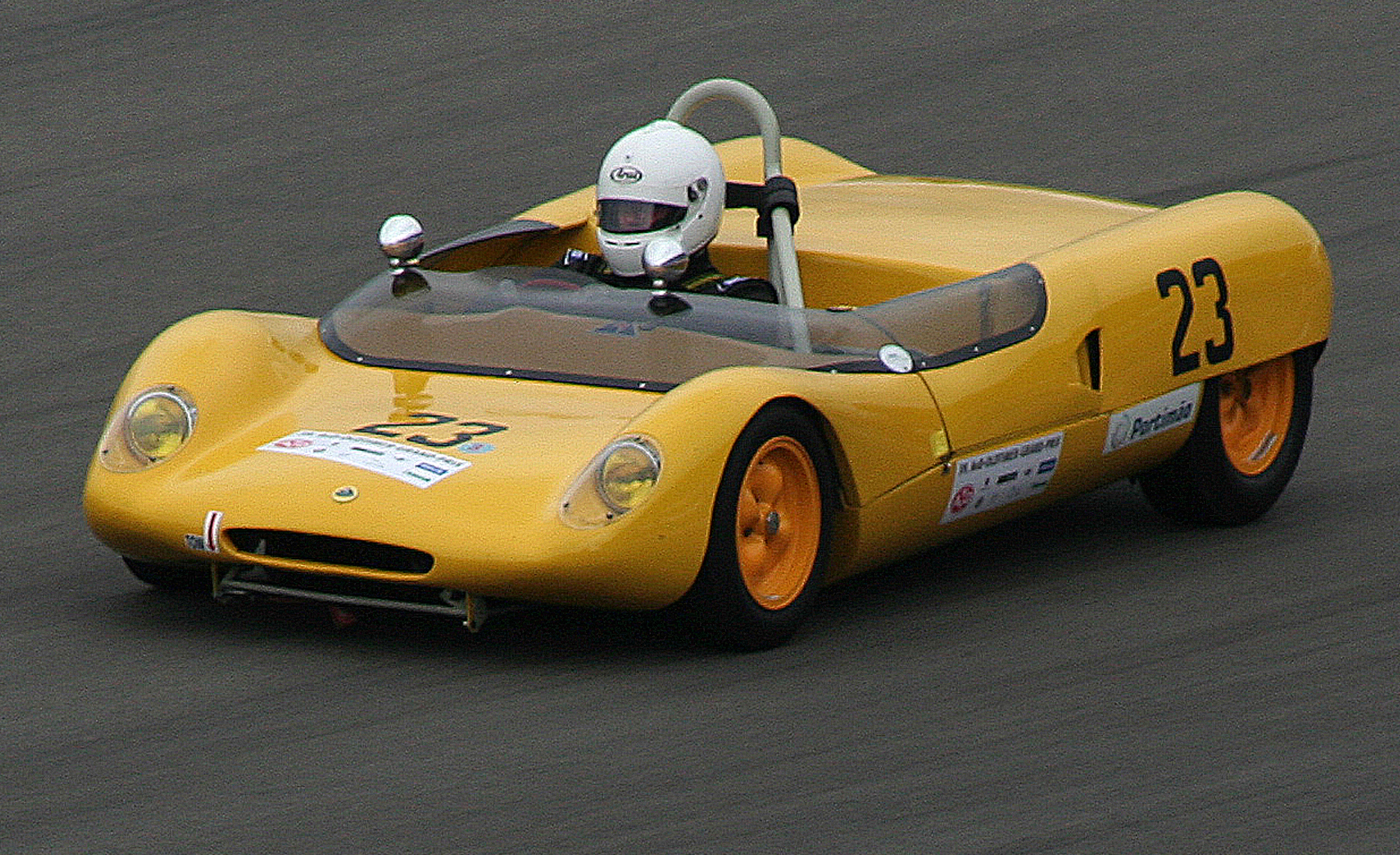 Lotus 23 B, Baujahr 1962, beim AvD-Oldtimer-Grand-Prix auf dem Nürburgring